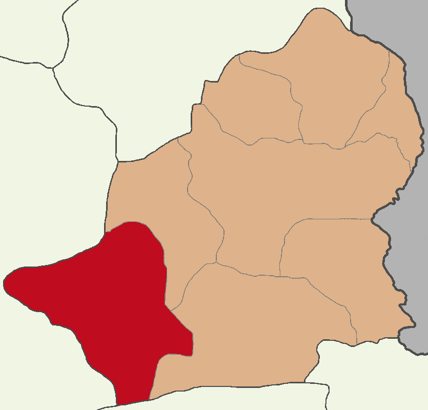 Sarıkamış ilçesinin konumu